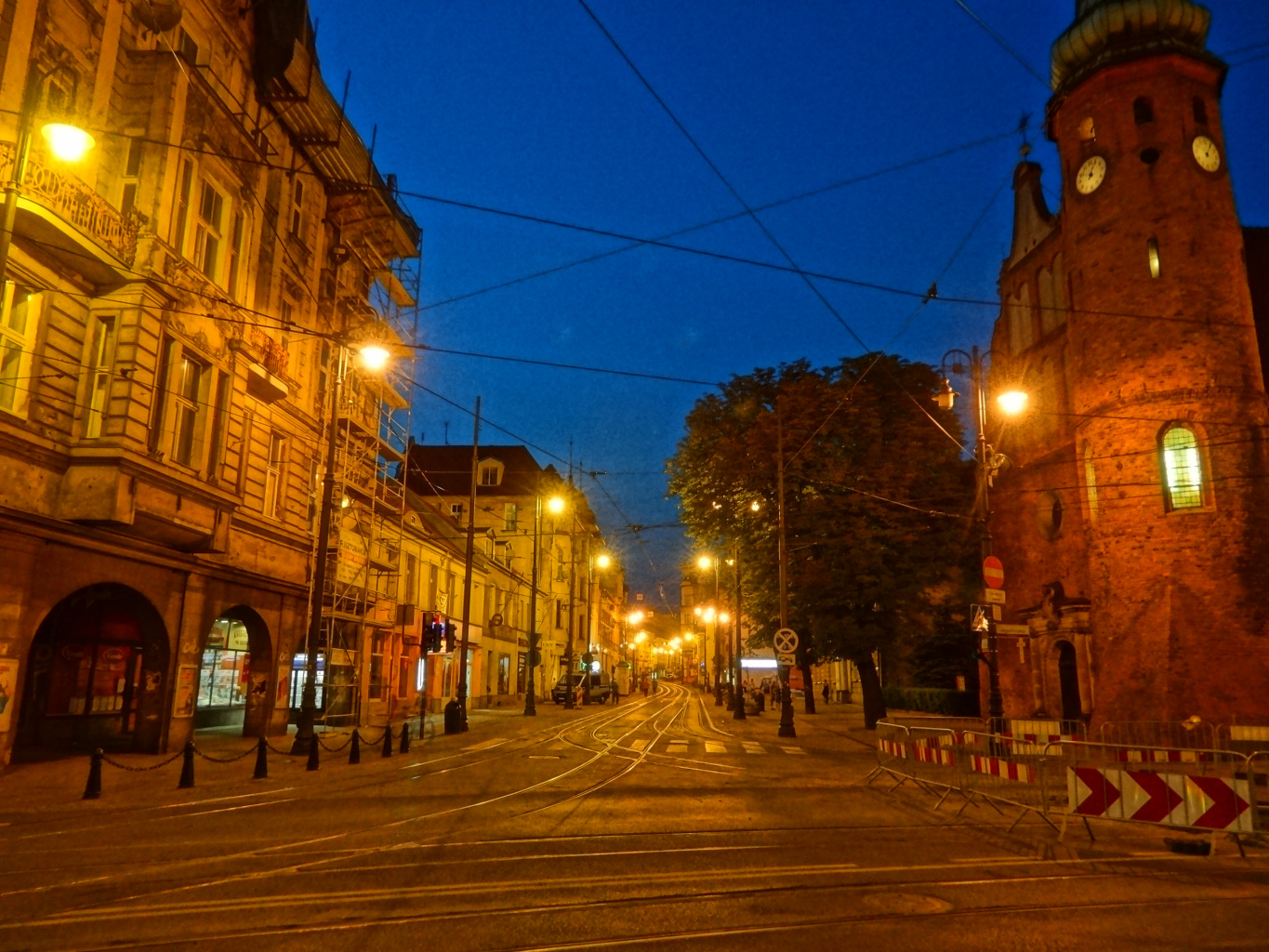 Ulica Gdańska w Bydgoszczy